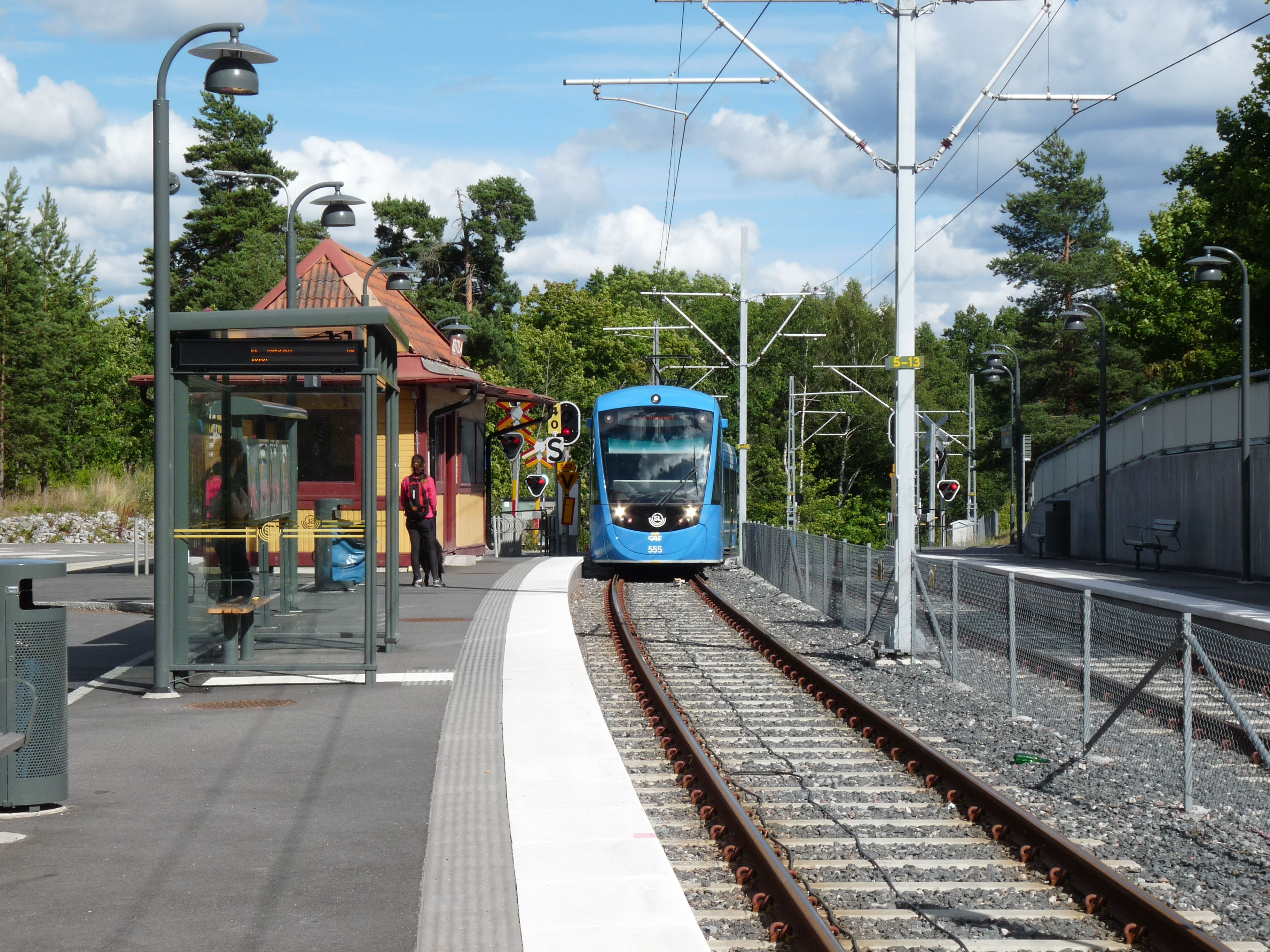 De trams in Lidingö